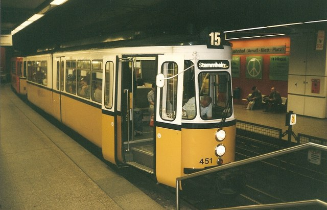 Stuttgarter Strassenbahn (Stuttgart - Tram)